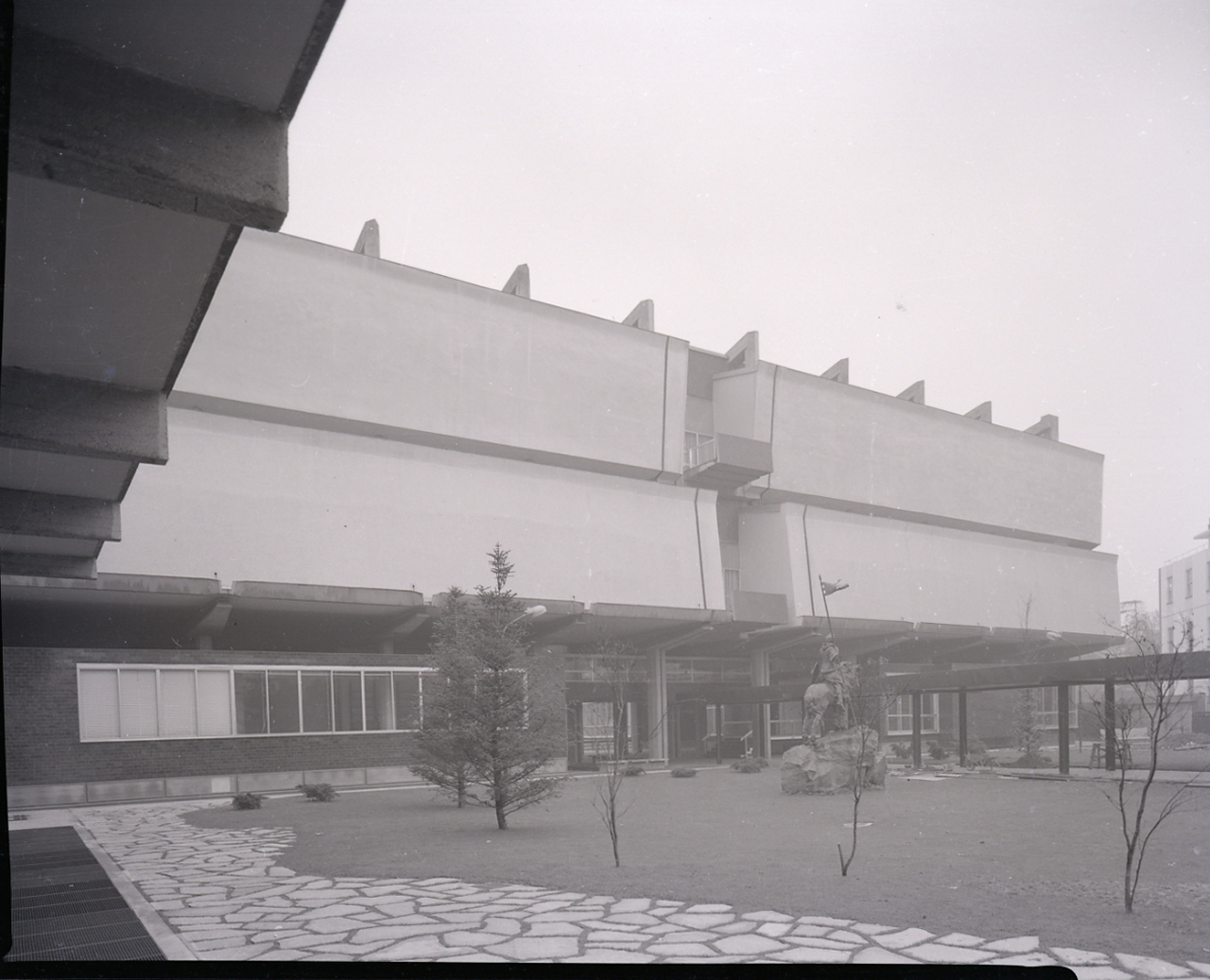 Servizio fotografico : Torino, 1959 / Paolo Monti. - Buste: 22, Fototipi: 24 : Negativo b/n, gelatina bromuro d'argento/ pellicola ; 10x12. - ((Serie costituita da 22 buste di negativi identificati con i nn.: 1683, 1684, 1685, 1686, 1687, 1688, 1689, 1670, 1671, 1672, 1673, 1674, 1675, 1676, 1677, 1678, 1679, 1680, 1681, 1682, 1683, 1684, 1685, 1686, 1687, 1688, 1689, 1690, 1691, 1692, 1693, 1694, 1695, 1696, 1697, 1698, 1699, 1700, 1701, 1702, 1703, 1704, 1705, 1706, e tenute insieme da una graffetta. . - Sulla busta identificata con la numerazione 1683/84 iscrizione didascalica manoscritta a pennarello: "Zodiac Torino/ Gall. Arte Mod.". . - Le buste sono numerate con numerazione progressiva da 1 a 22. - Le buste identificate con la numerazione 1683/84, 1689/90 contengono ciascuna 2 negativi identificati con lo stesso numero di inventario. - Il nuovo edificio della Gam venne inaugurato nel 1959. - Occasione: Documentazione per le pubblicazioni: "Zodiac", Milano, Edizioni di Comunità, 1960 ca. - Occasione: Santini Pier Carlo, "La galleria d'Arte Moderna di Torino", pagg.66-79, in "Comunità", Milano, anno XIV, n°76, gennaio 1960. - , presso Archivio Paolo Monti. - Fonte: Periodico: Zodiac, Milano, Edizioni di Comunità (1960). - Fonte: Periodico di Santini, Pier Carlo: La galleria d'Arte Moderna di Torino, pagg.66-79, in Comunità, Milano, anno XIV, n°76, gennaio 1960 (1960/01). Foto di Paolo Monti e altri. - Fonte: Rubrica di Paolo Monti: Archivio 10x12 (ultimi numerati) - dal G1 al (s.d.)